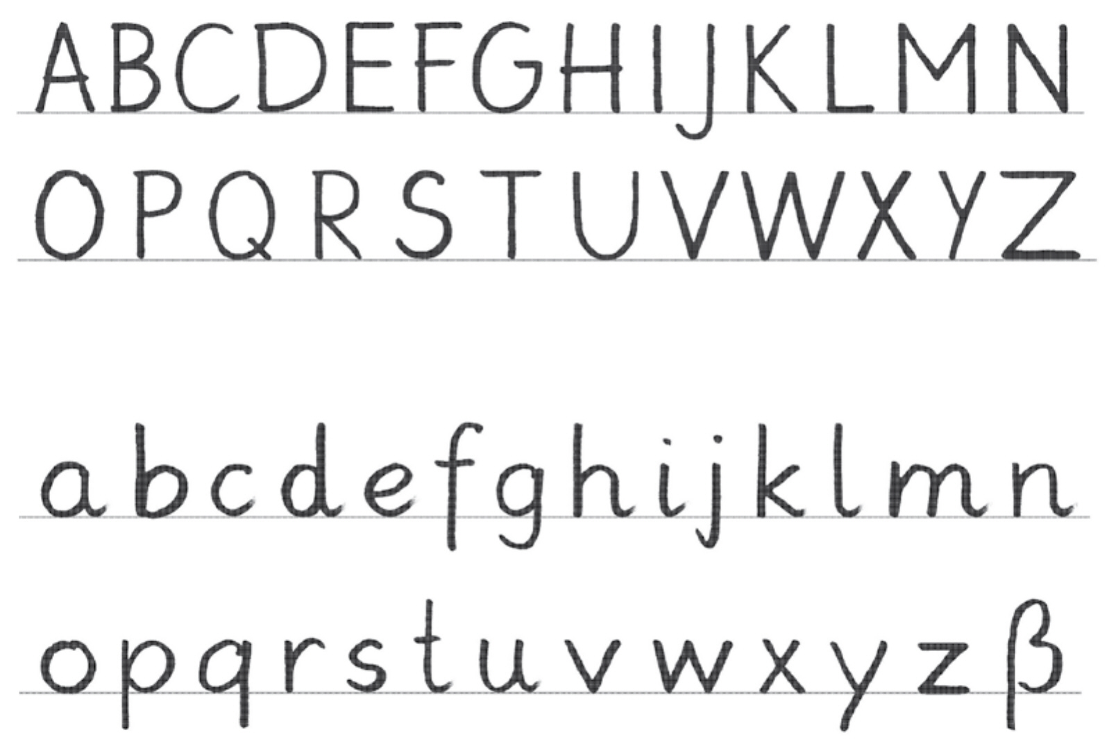 Druckbuchstaben als Handschrift